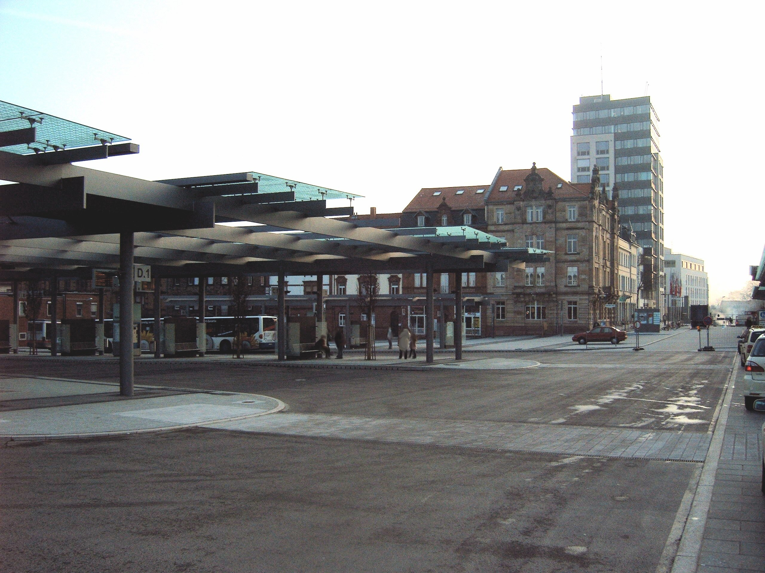 Busbahnhof am Hauptbahnhof. Korrigiert von Luxo. Farbton korrigiert. Nr. 1.